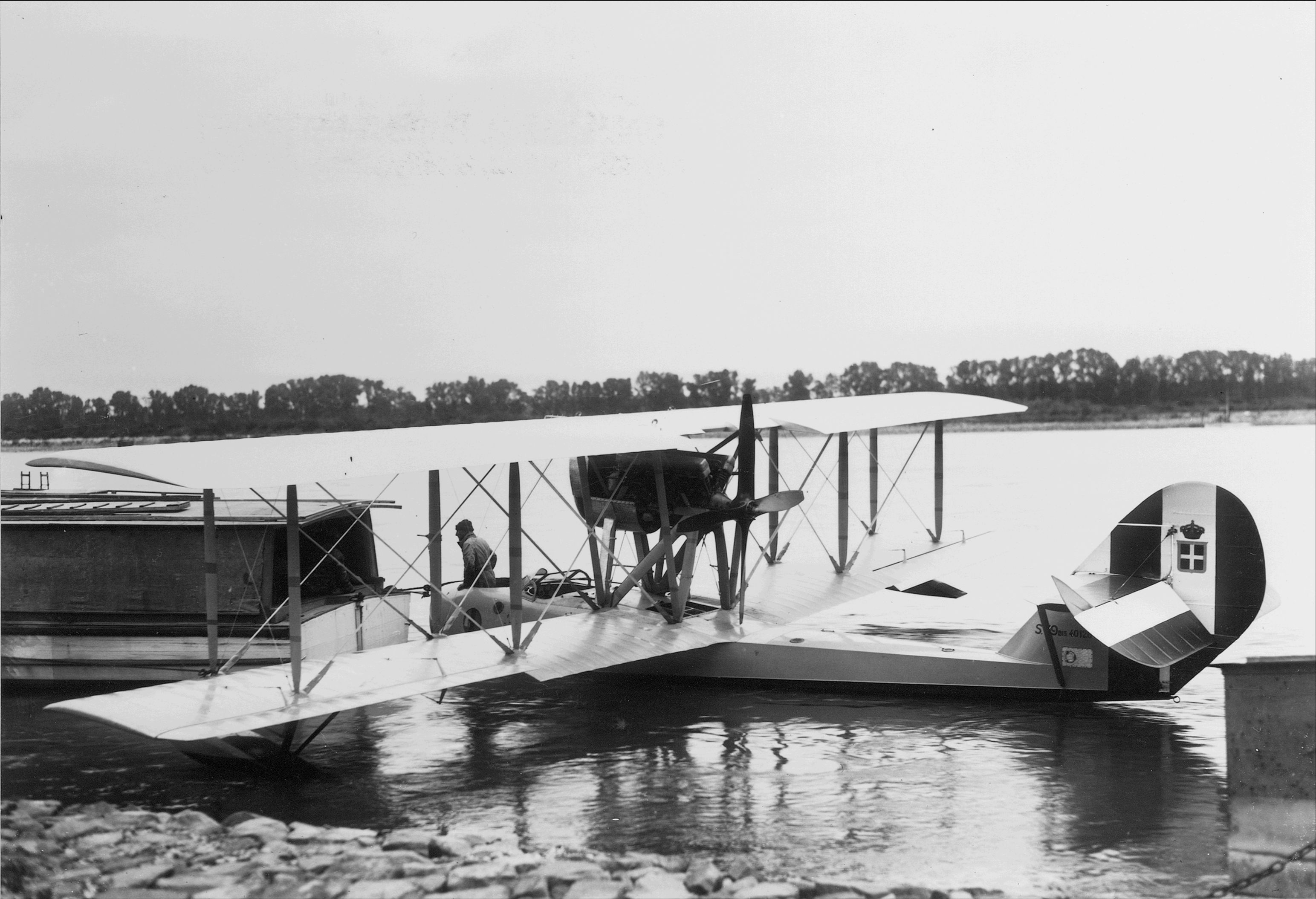 Wasserflugzeug, Langensee, am Ufer angelegt, italienische Immatrikulation